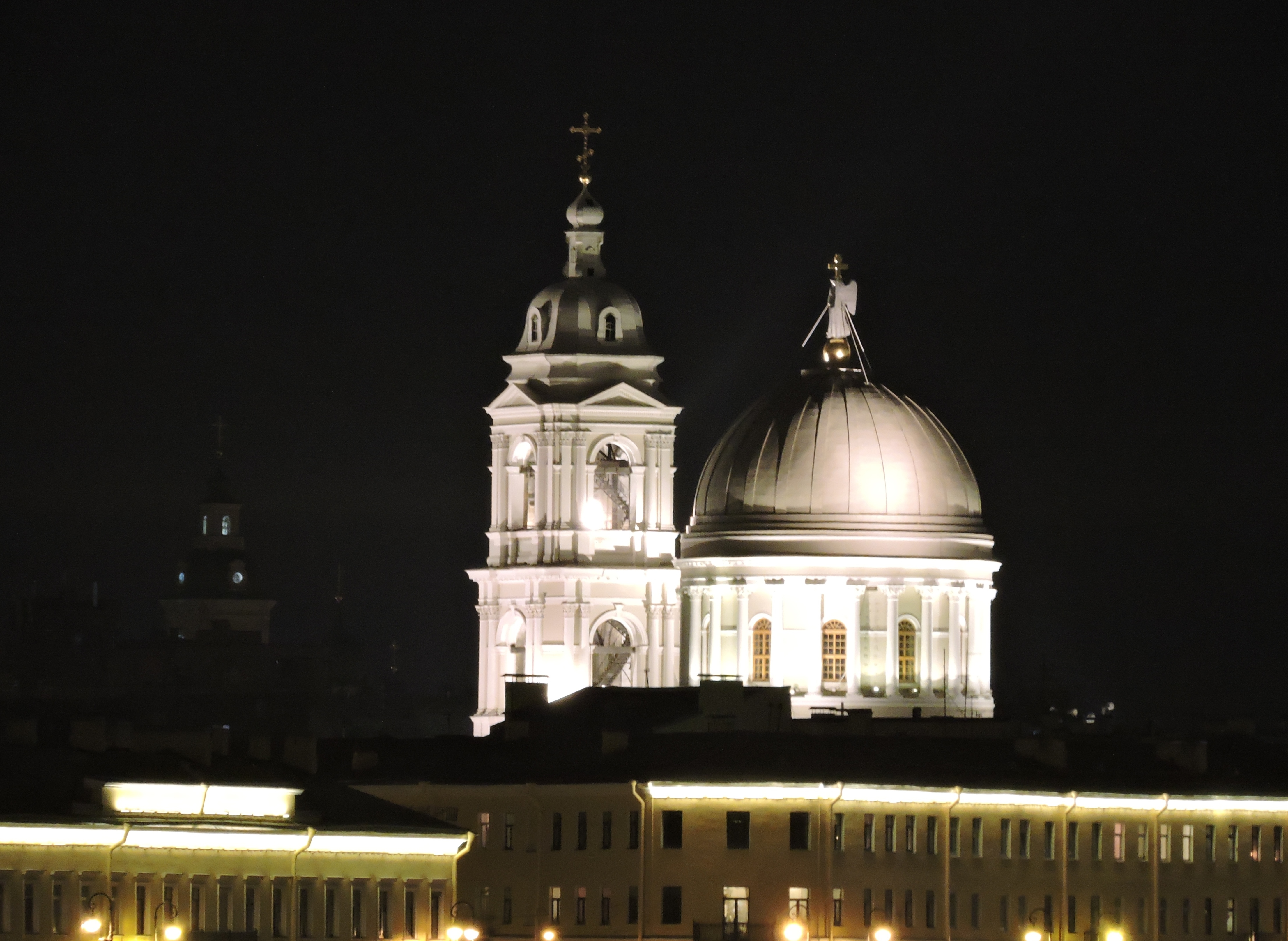 Церковь Святой Екатерины ночью